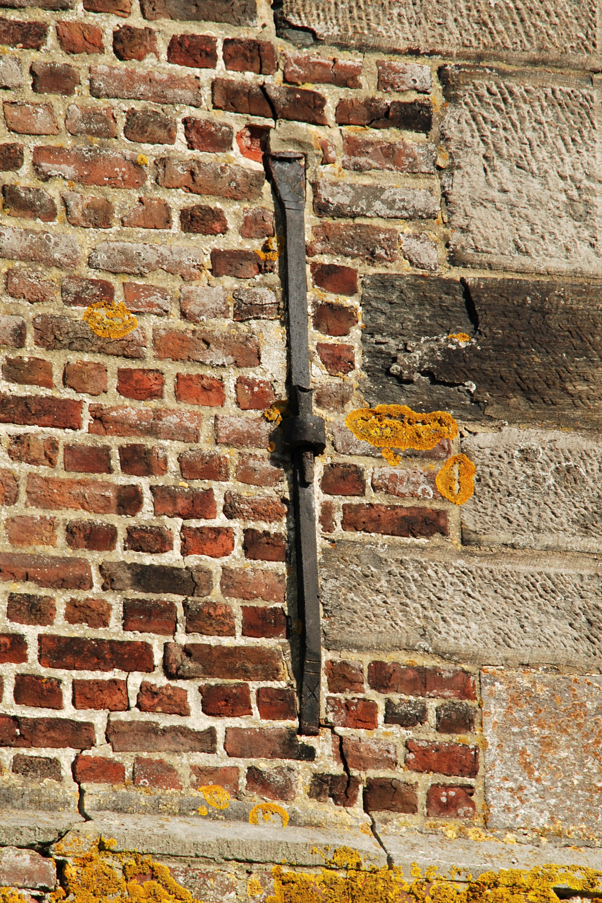 Belgique - Brabant wallon - église Saint-Martin de Ways - ancre de façade